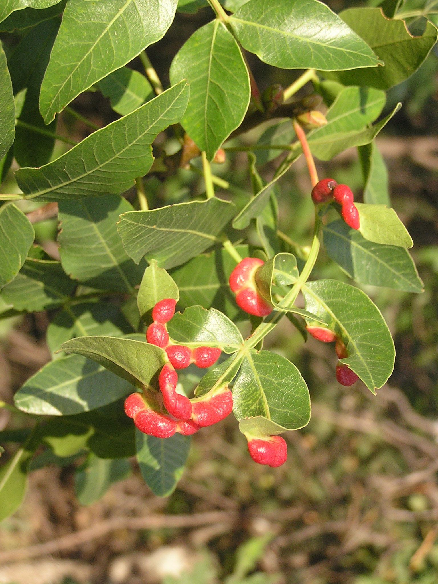 Растение